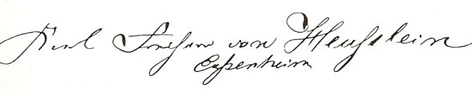 Signature of Carl Leo Freiherr Heußlein von Eußenheim (1838-1870) in Bad Kissingen